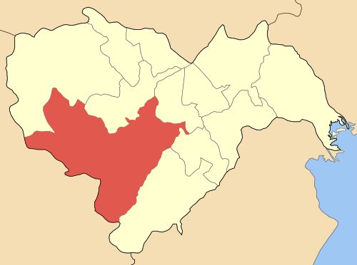 Дем Бер на картата на Ном Иматия, Гърция. Locator map of Veroias municipality (Δήμος Βέροιας) at Imathias perfecture, Greece.